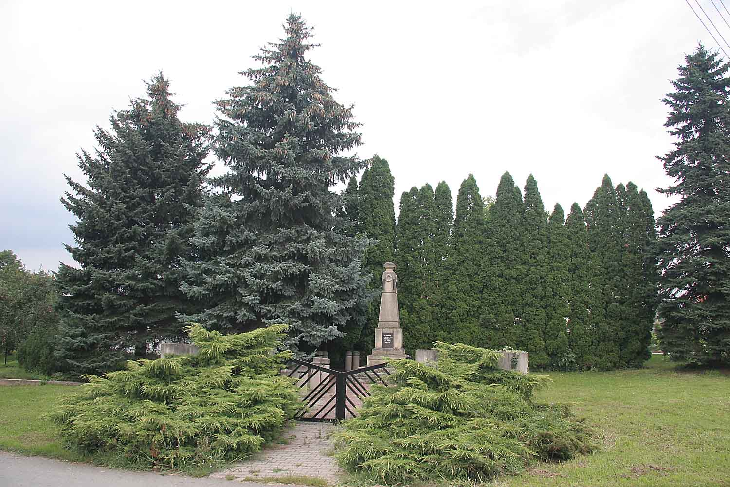 Mokrovousy - pomník padlým v I. světové válce, village in Hradec Králové district, Czech Republic Autor:Prazak Date: 26. 8. 2006